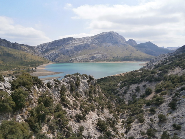 Stausee de Cuber auf Mallorca